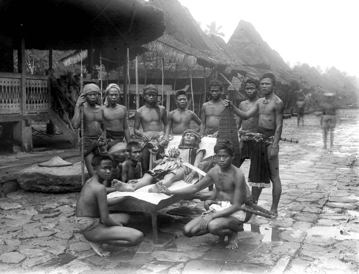 Negatief. Een stervend Sioeloe hoofd temidden van een groep mannen, Zuid-Nias